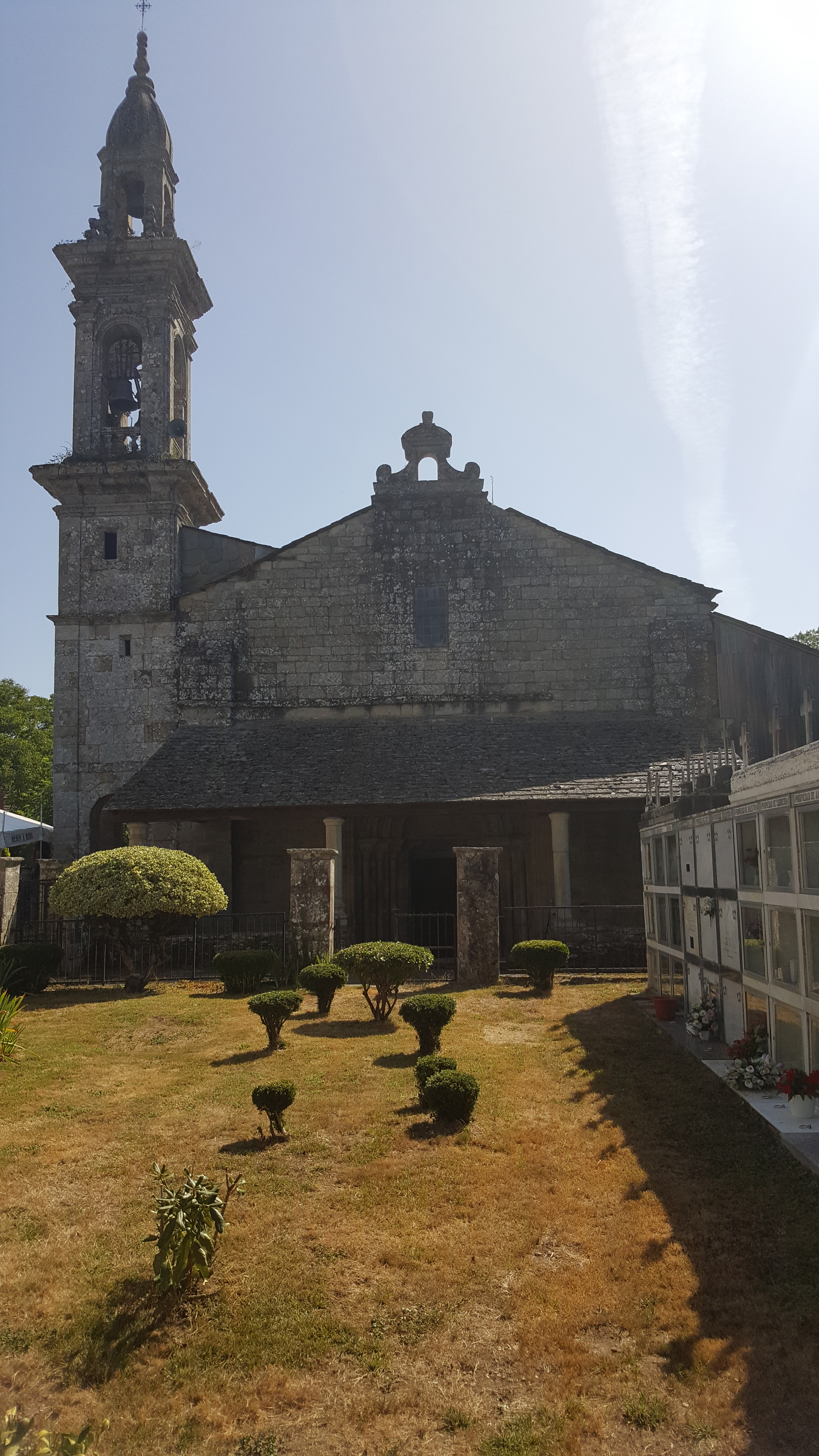 Igrexa Monasterio de Ferreira de Pallares (Guntín)